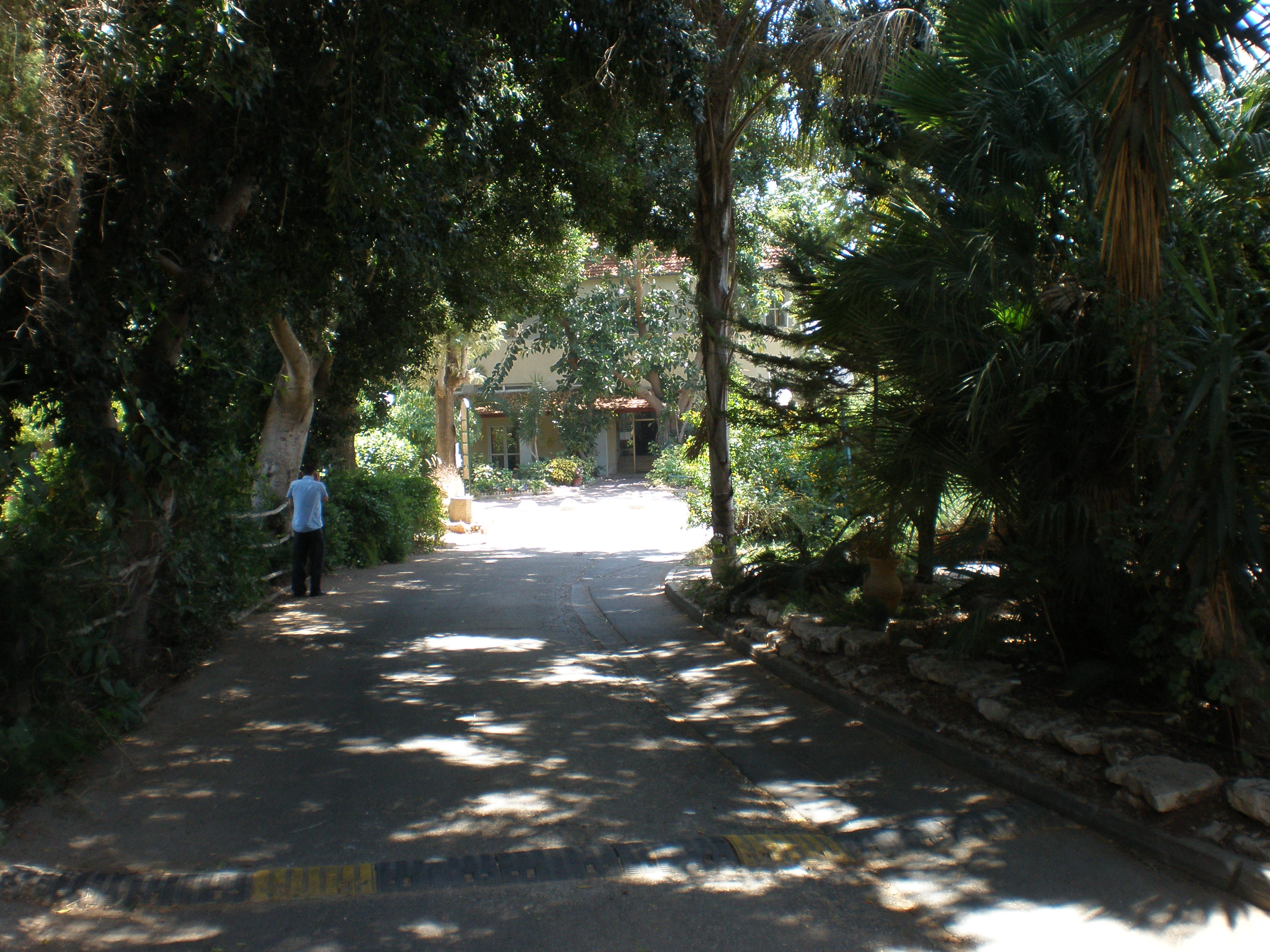 כפר הנוער מוסנזון